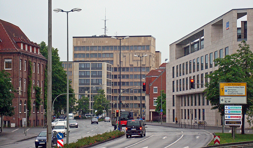 Gütersloh an der Friedrich-Ebert-Straße mit Rathaus (Mitte) und Volksbankzentrale (rechts)